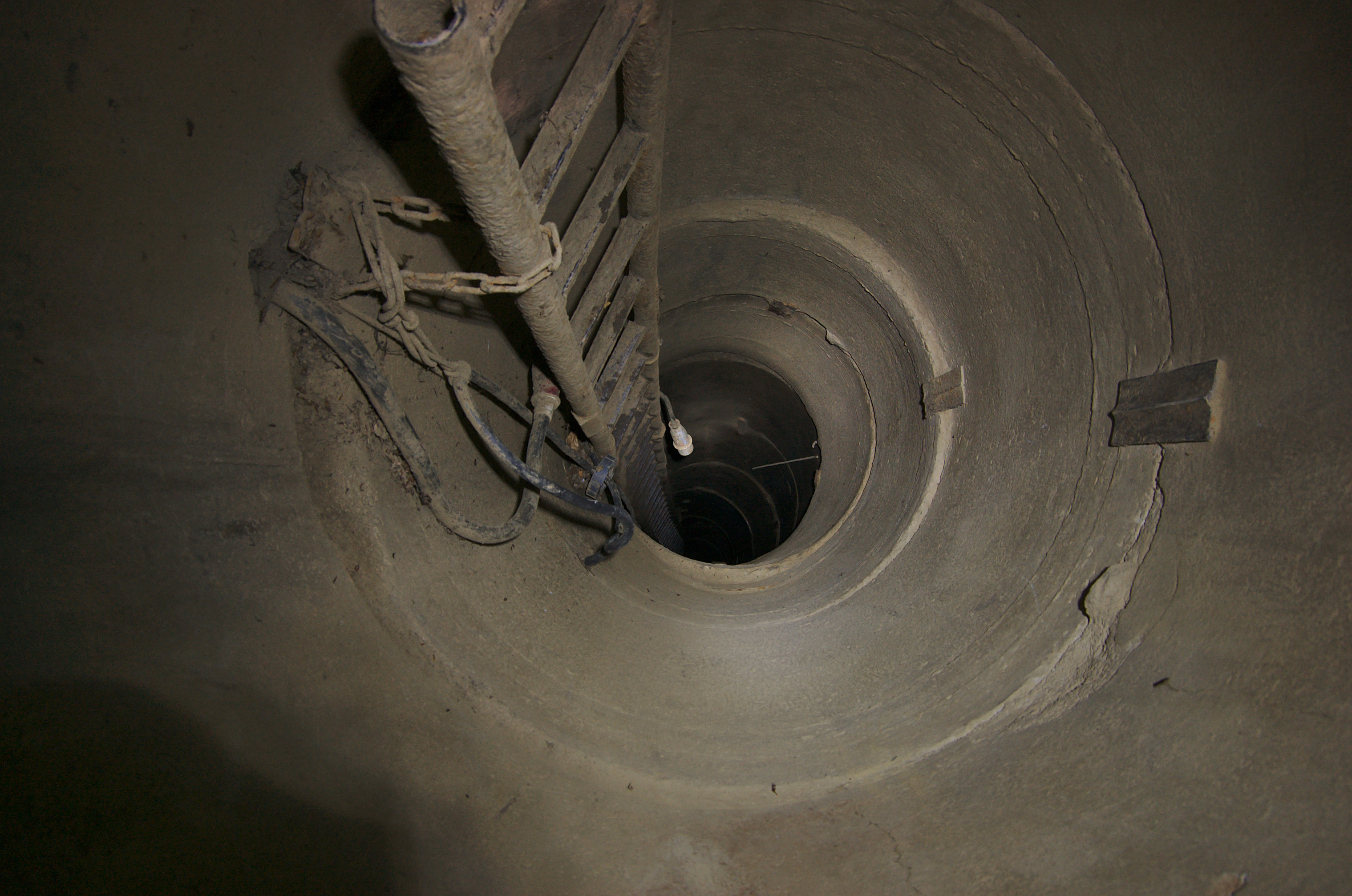 Vchod do jeskyně Spirálka, Holštejn, okres Blansko